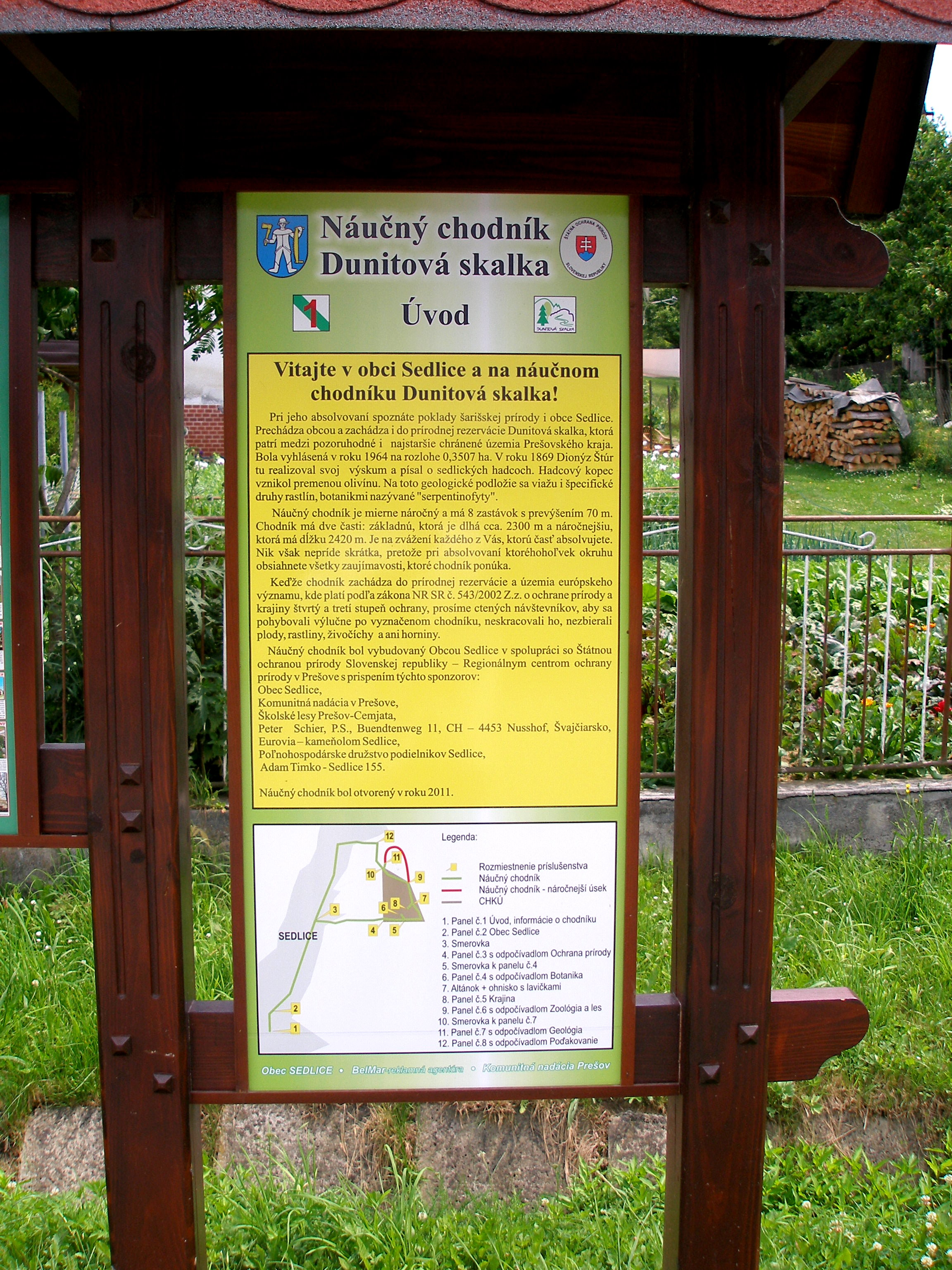 Náučný chodník.Prírodná rezervácia Dunitová skalka. Obec Sedlice okres Prešov. Región Šariš.